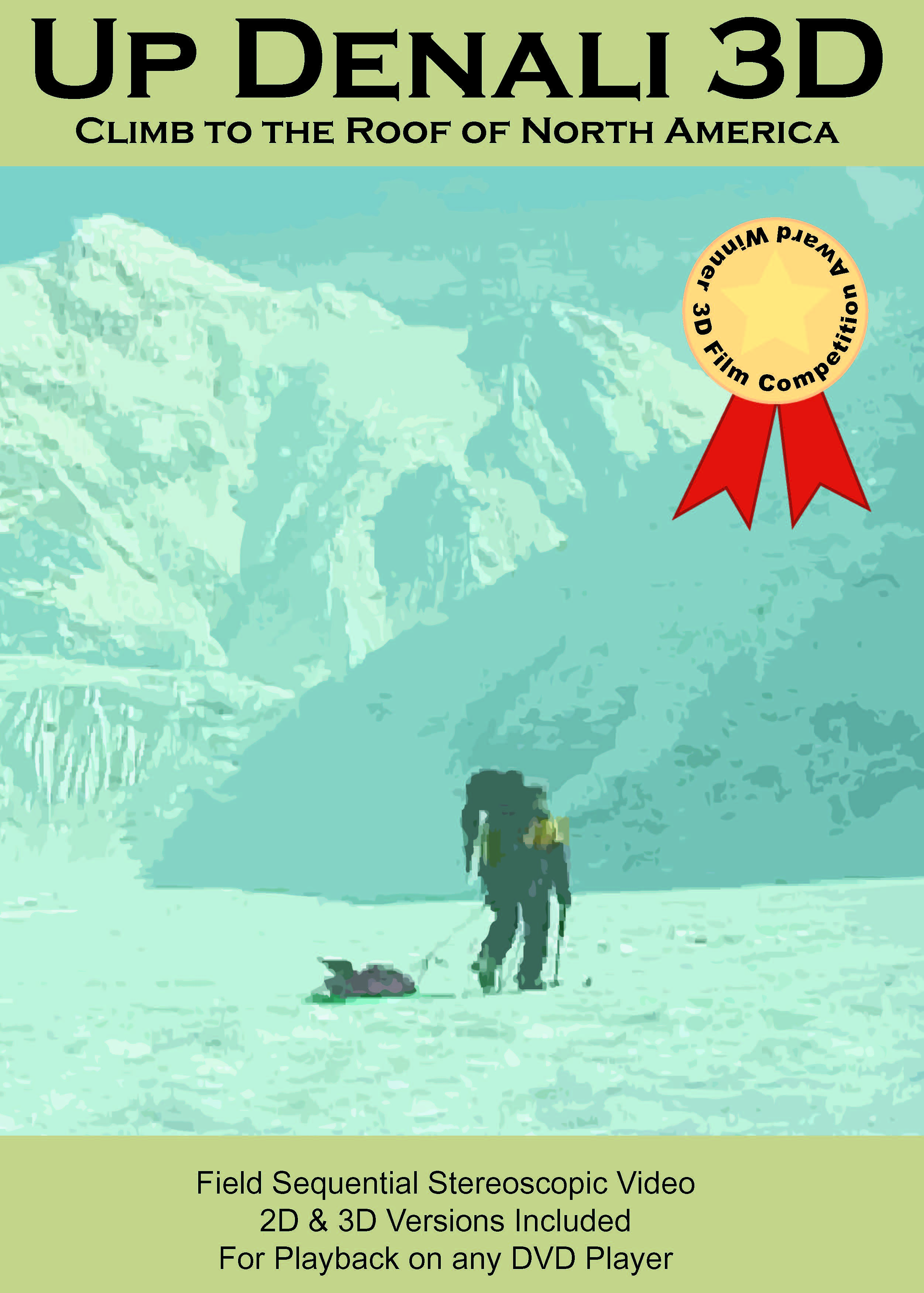 Cover art for Up Denali 3D